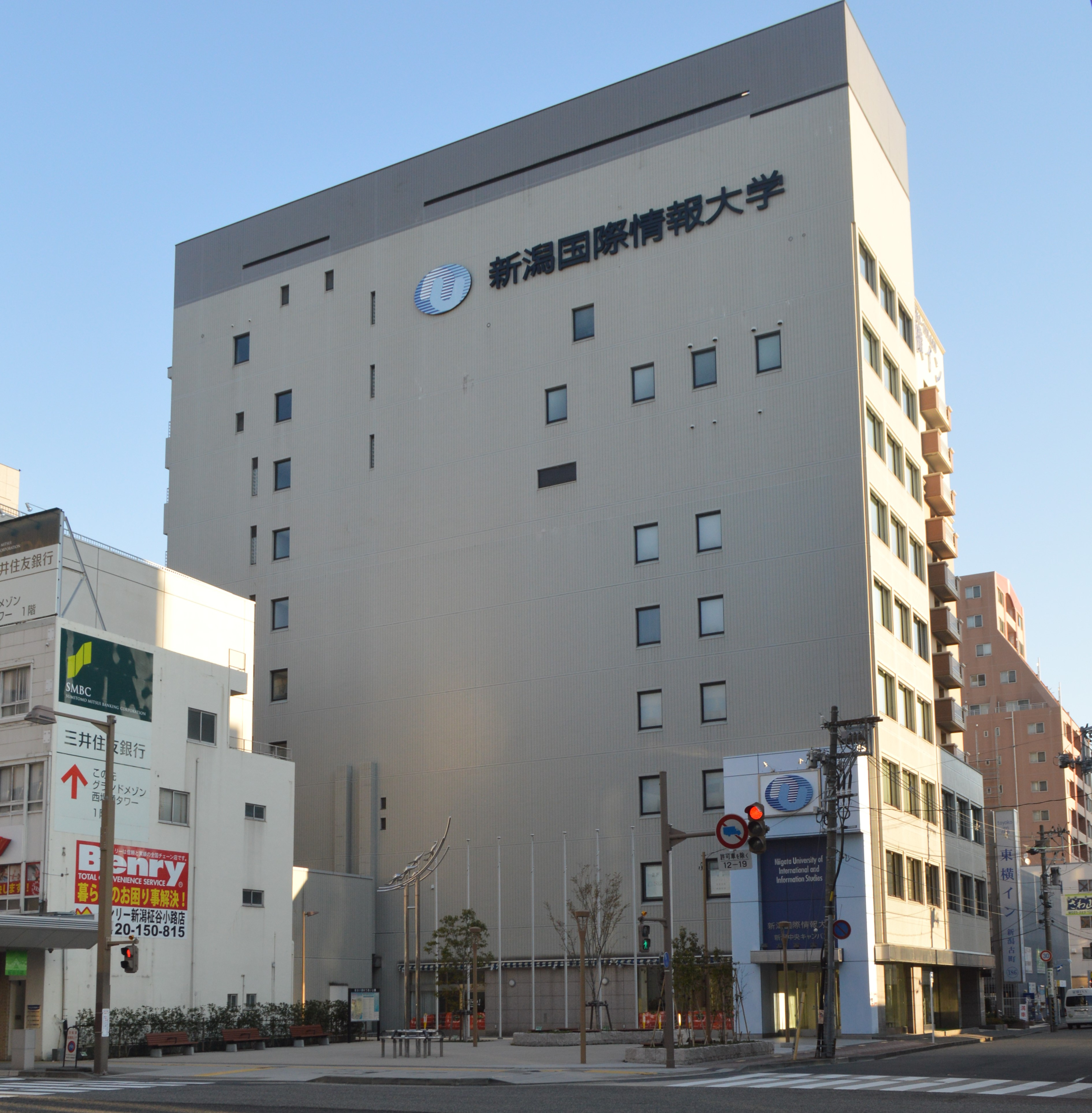 新潟県新潟市中央区にある新潟国際情報大学の新潟中央キャンパス。